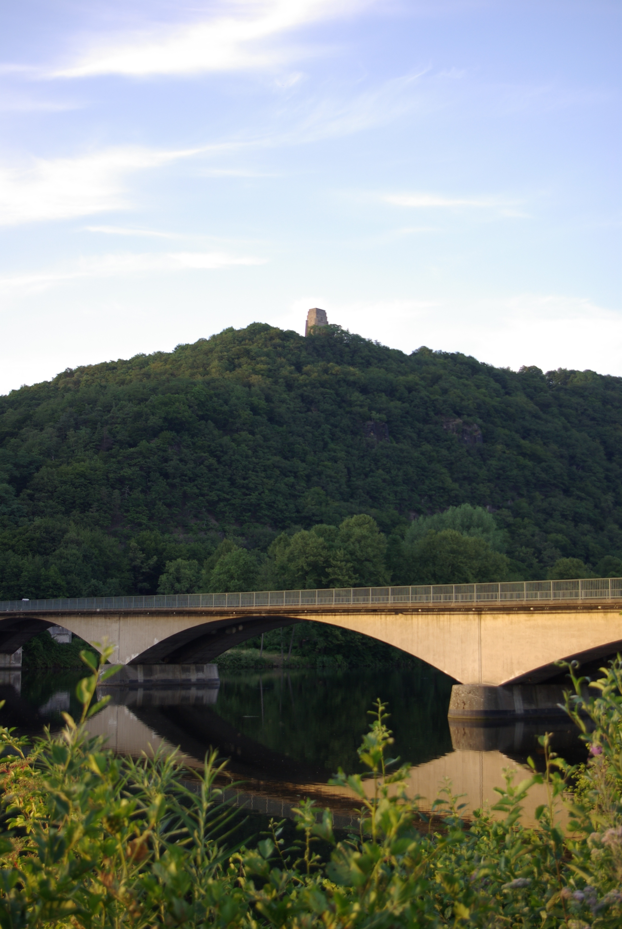 Hengsteysee mit Blick auf die Syburger Ruhrbrücke und den Syberg mit dem Kaiser-Wilhelm-Denkmal